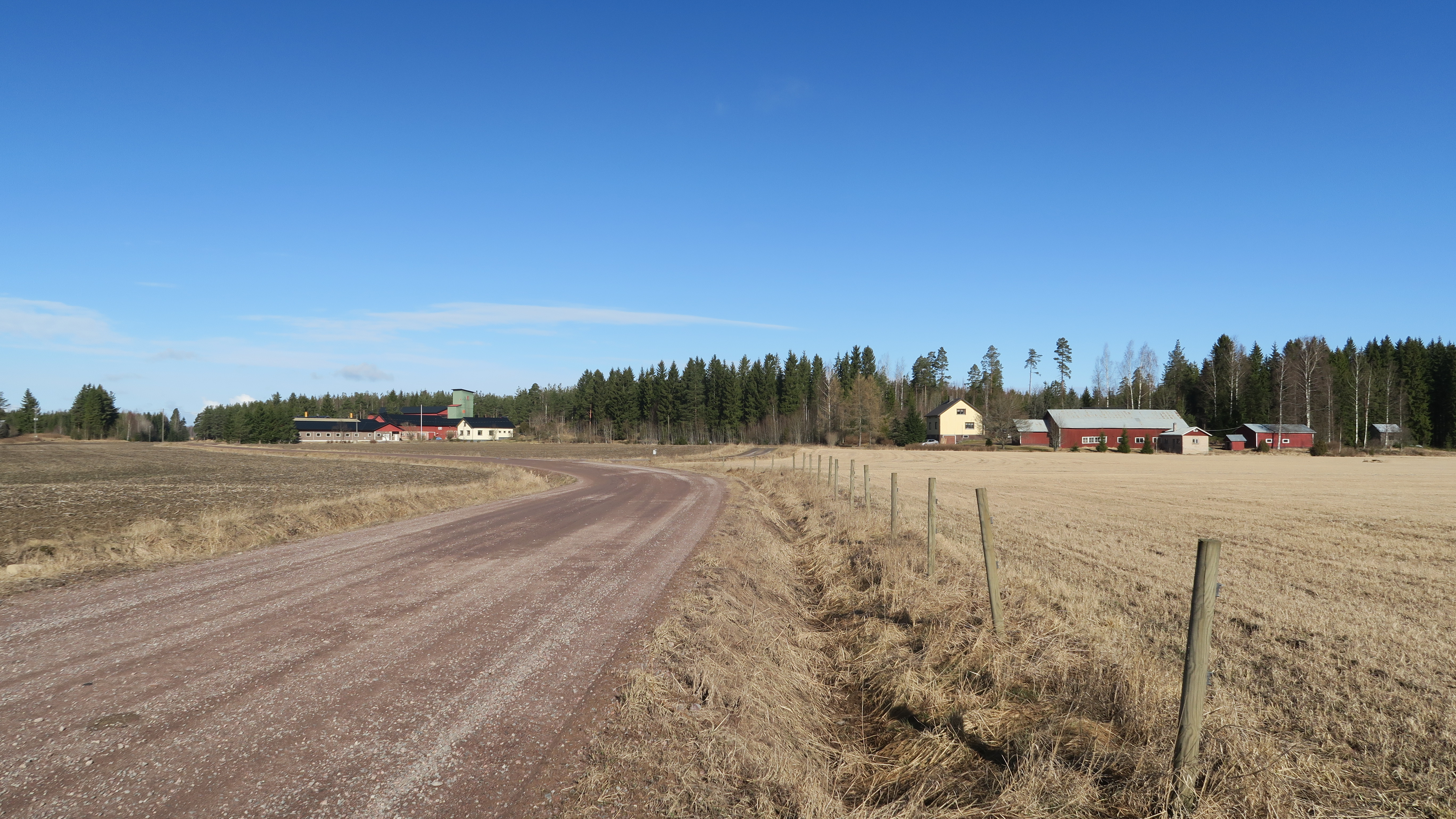 Pöytyän Ortenojan kylän peltoja Pöytäsuontien varrella huhtikuussa 2017. Kuvan talot ovat Ortenojan kartanon maille 1940-luvulla siirtoväen maanhankinnassa perustettuja viljelystiloja.